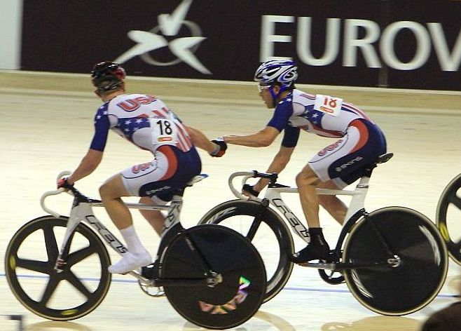 Campeonato del mundo de ciclismo en pista 2010 (Copenhagen). Daniel Holloway y Colby Pearce de los Estados Unidos haciendo el relevo en la prueba Madison.